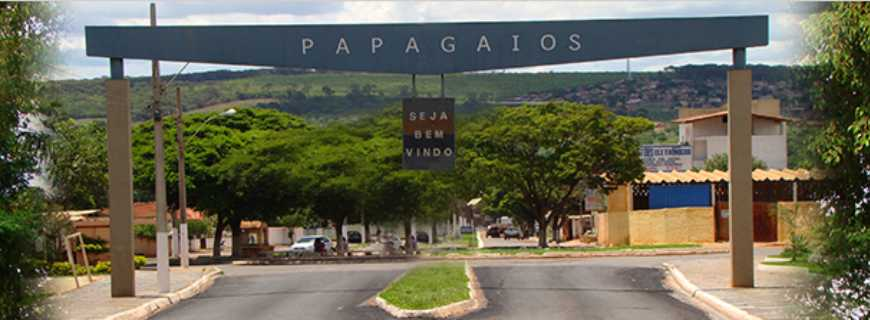 Entrada da Cidade Papagaios Minas Gerais.